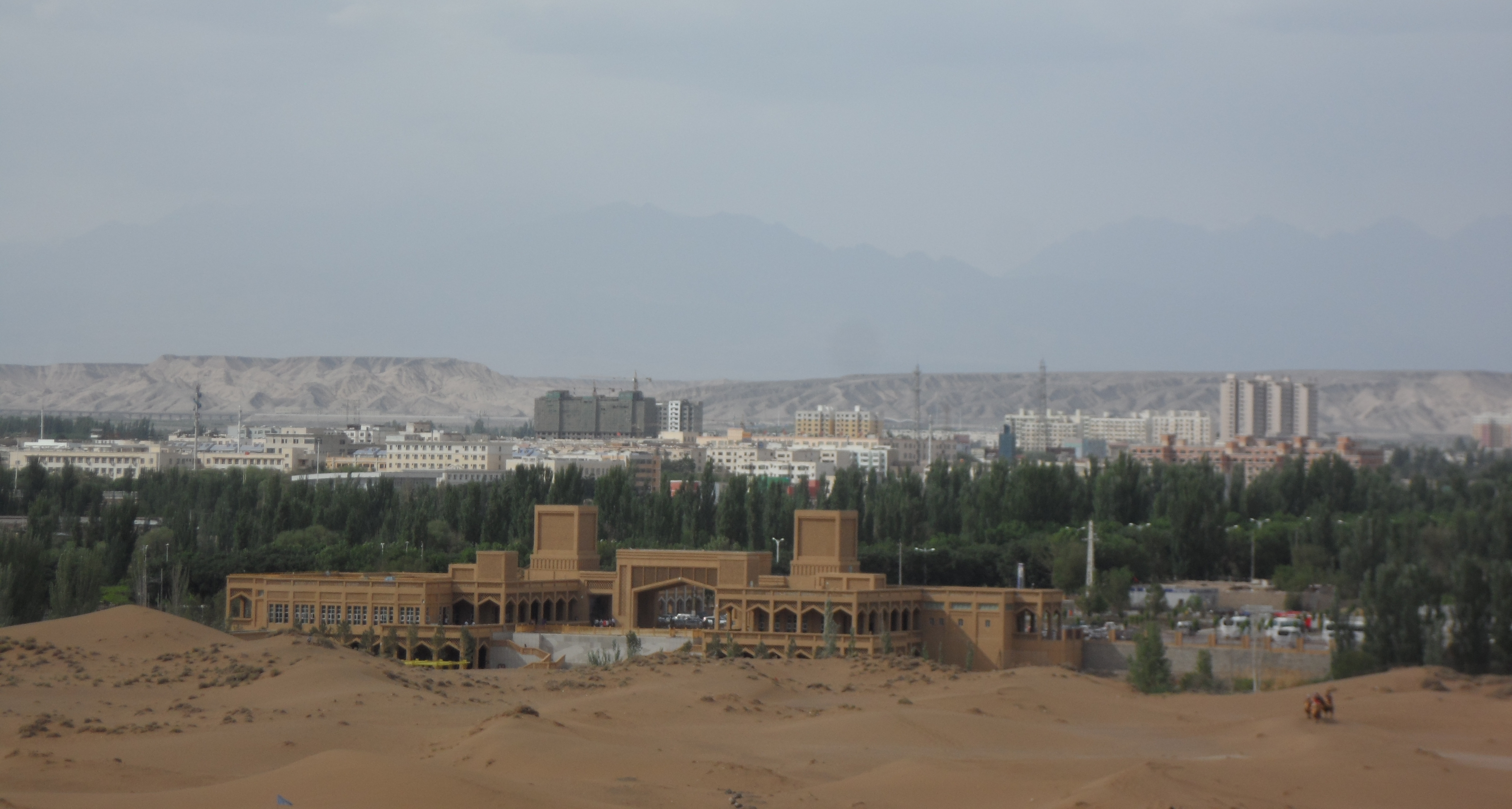 新疆鄯善县